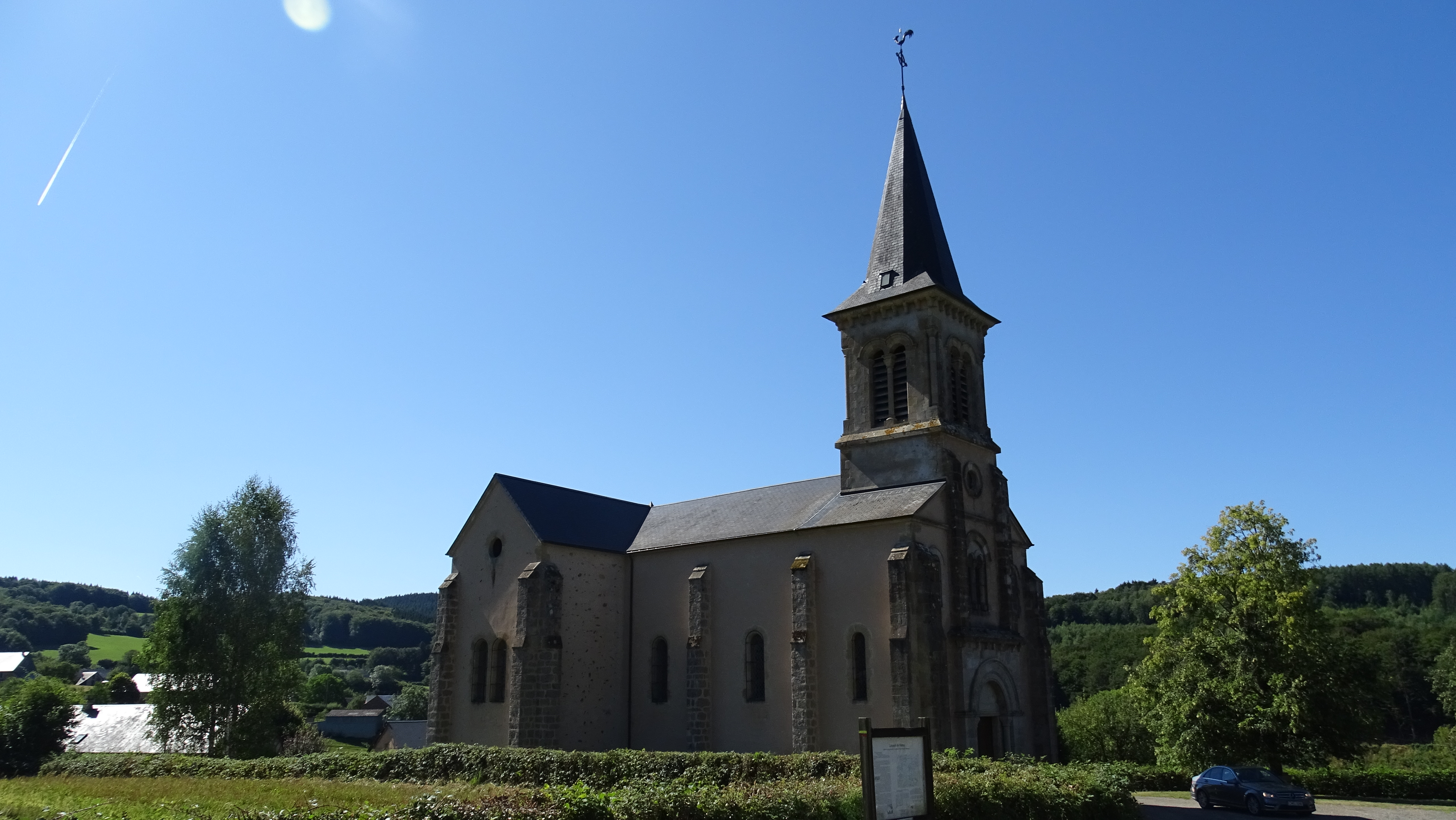 Lavault-de-Frétoy est une commune française située dans le département de la Nièvre, en région Bourgogne-Franche-Comté. Lavault-de-Frétoy est un village d'environ 70 habitants et situé au cœur du massif du Morvan, dans son parc naturel régional. Environ 75 % du territoire de la commune est occupé par la forêt, ce qui en fait la commune la plus boisée du Morvan et l'une des plus boisées de la Bourgogne-Franche-Comté.